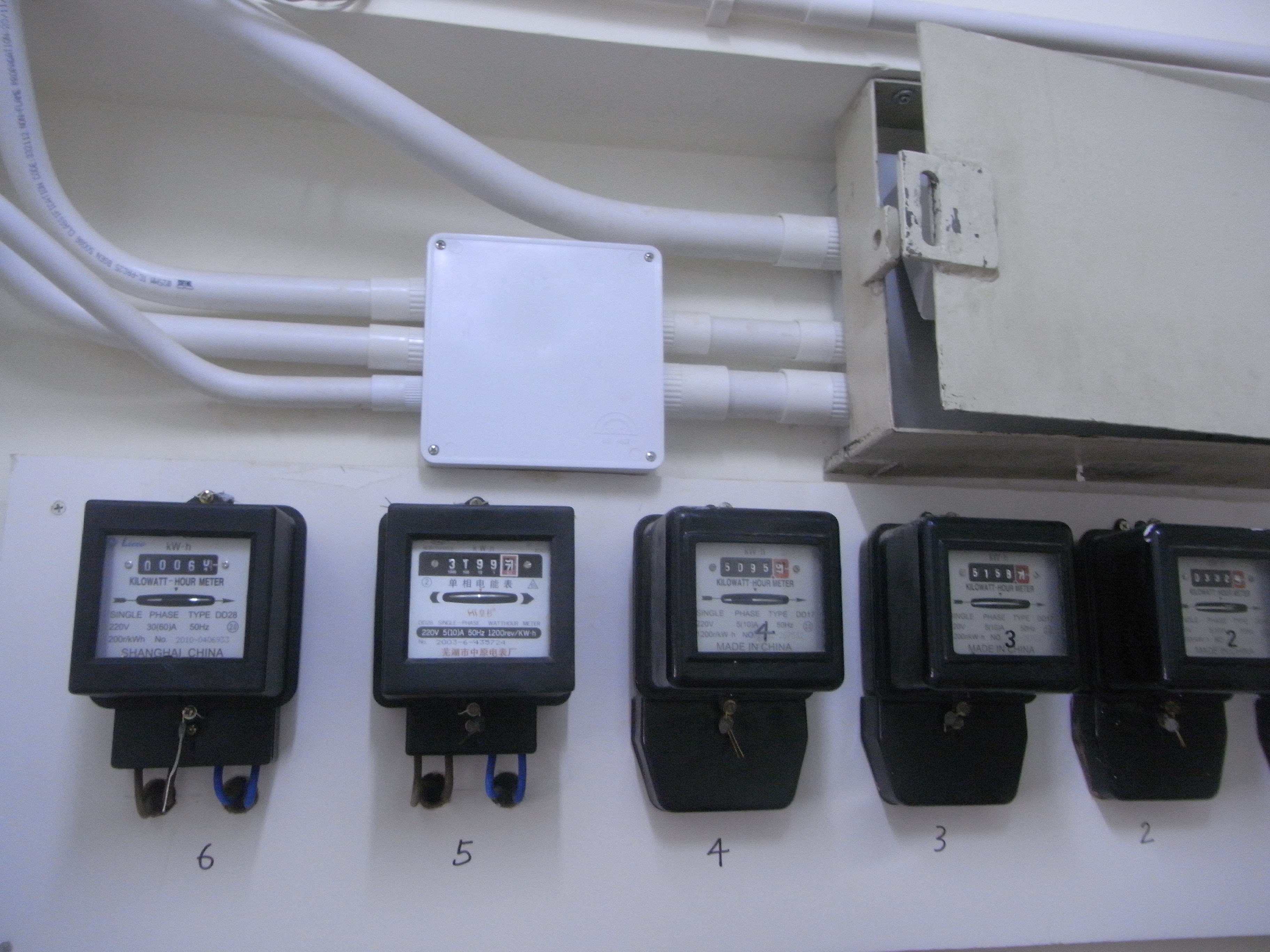 中文（香港）: 香港島唐樓